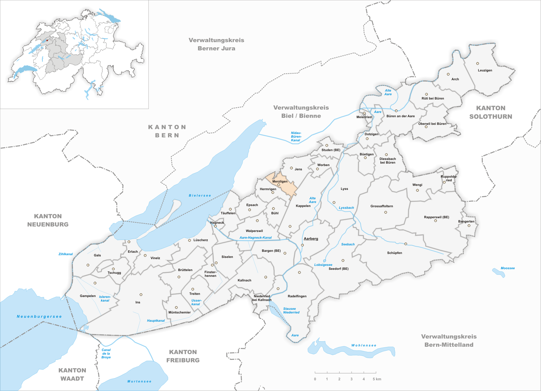 Municipality Merzligen